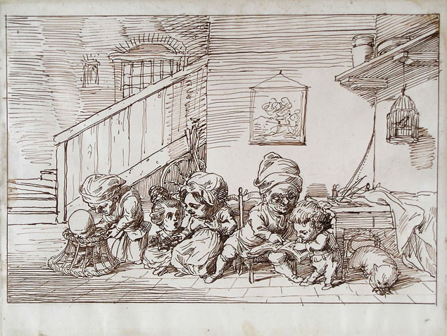 Giuseppe Macinata, Famiglia di nani, inchiostro su carta